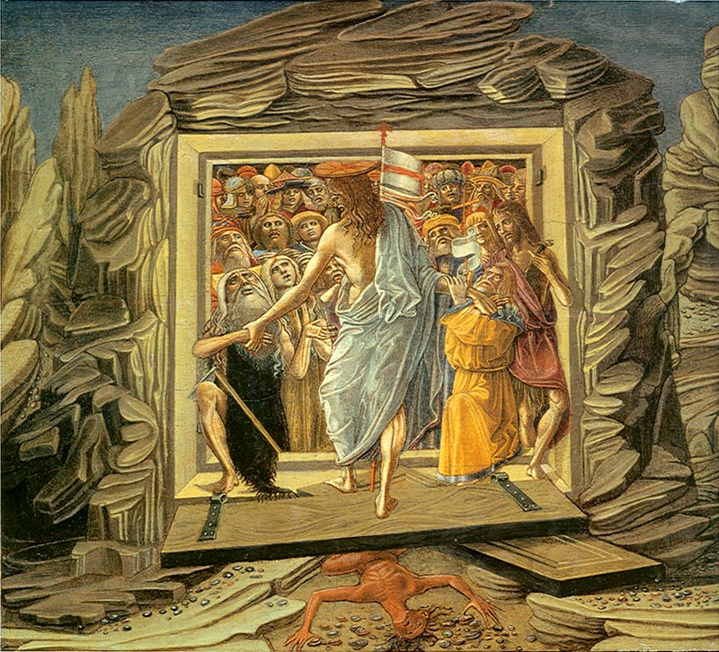 Descent-into-limbo-_1491_Вашингтон_НГИ1.jpg